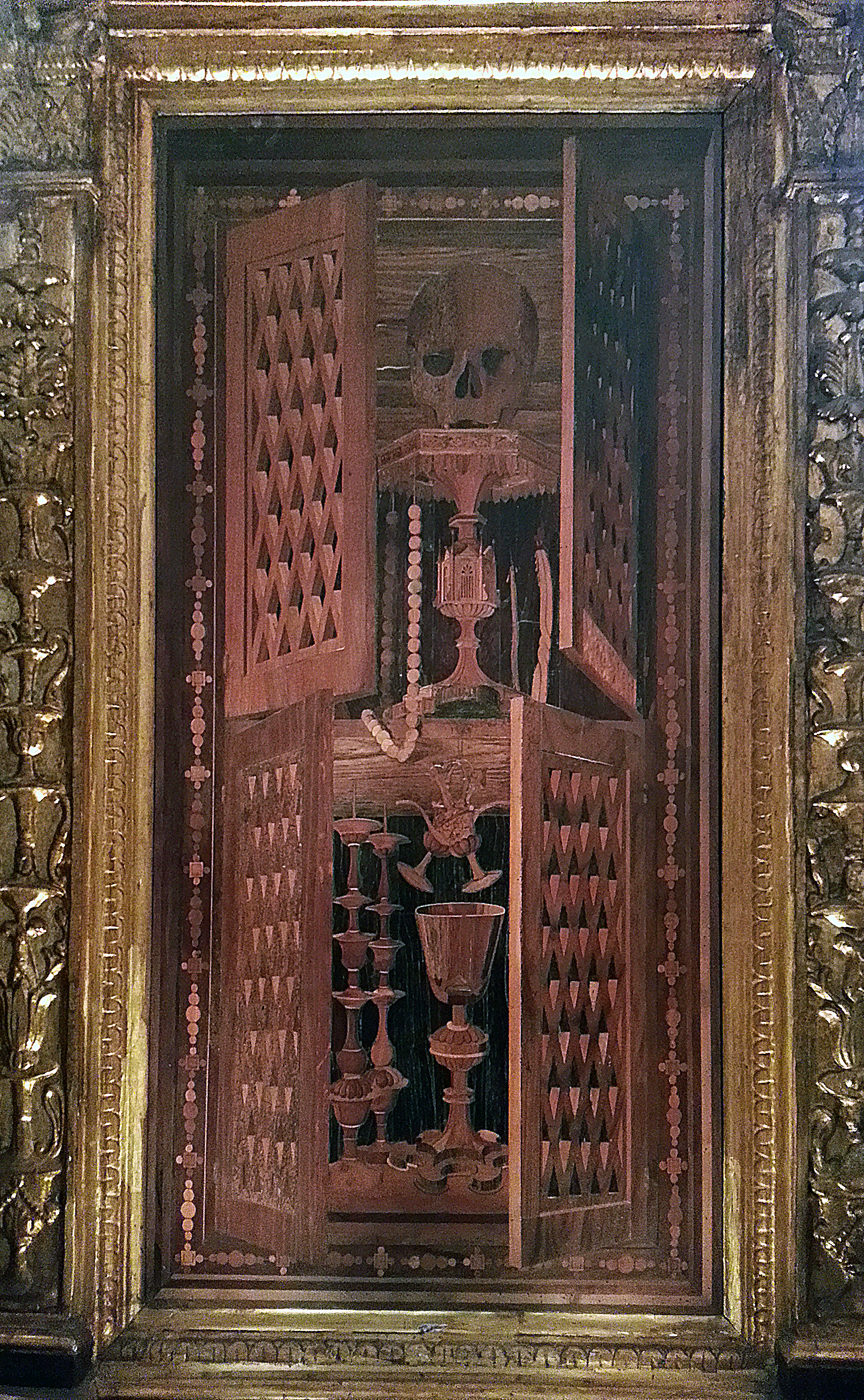 Tarsie nella sagrestia del Vasari nella Chiesa di Sant'Anna di Monteoliveto, Napoli